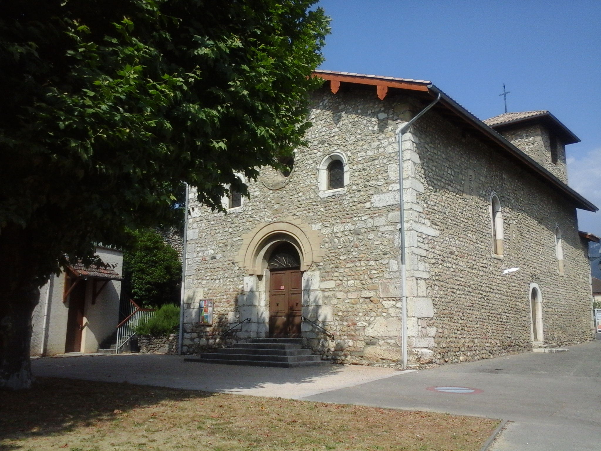 Poliénas, Isère, juillet 2015.